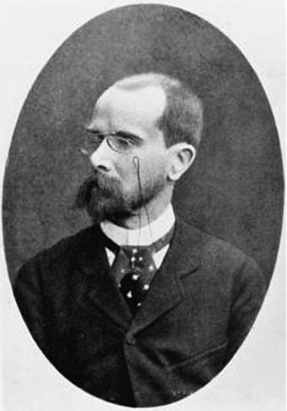 Eugène-Anatole Demarçay (París, 1 gener 1852 - París, 5 març 1903) fou un químic francès, especialista en estudis d'espectroscòpia, i conegut per haver descobert l'element químic europi.